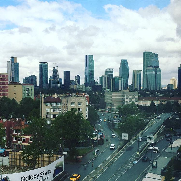 Levent bölgesindeki dev gökdelenler sağdan sola sırasıyla İstanbul Sapphire, İş Kuleleri, Soyak Kristal Kule, Tekfen Tower, Levent 199,Apa Giz, Nidakule Levent. (Mayıs 2016)